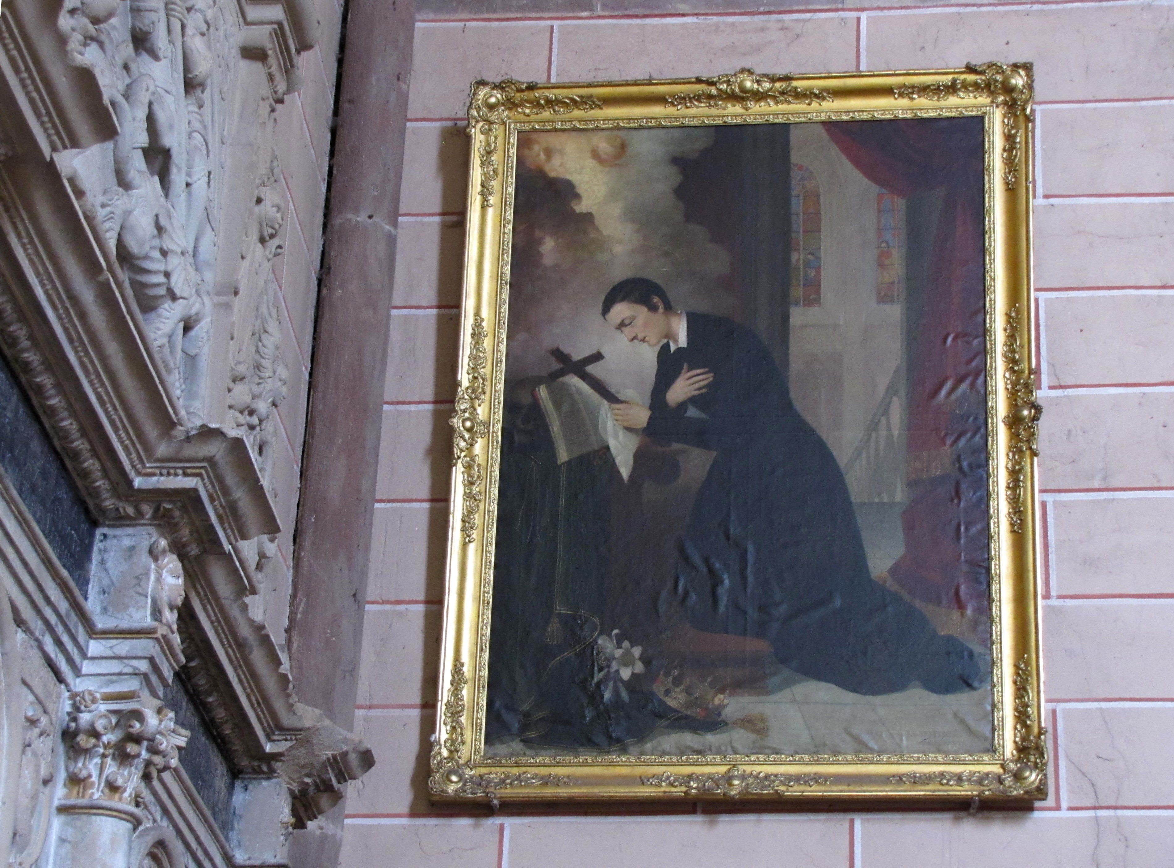 Alsace, Bas-Rhin, Abbatiale Saint-Étienne de Marmoutier (PA00084783, IA67007715). Tableau "Saint-Louis de Gonzague priant" (A-B. PELLERIN, huile sur toile, 130cm de large, XIXe)